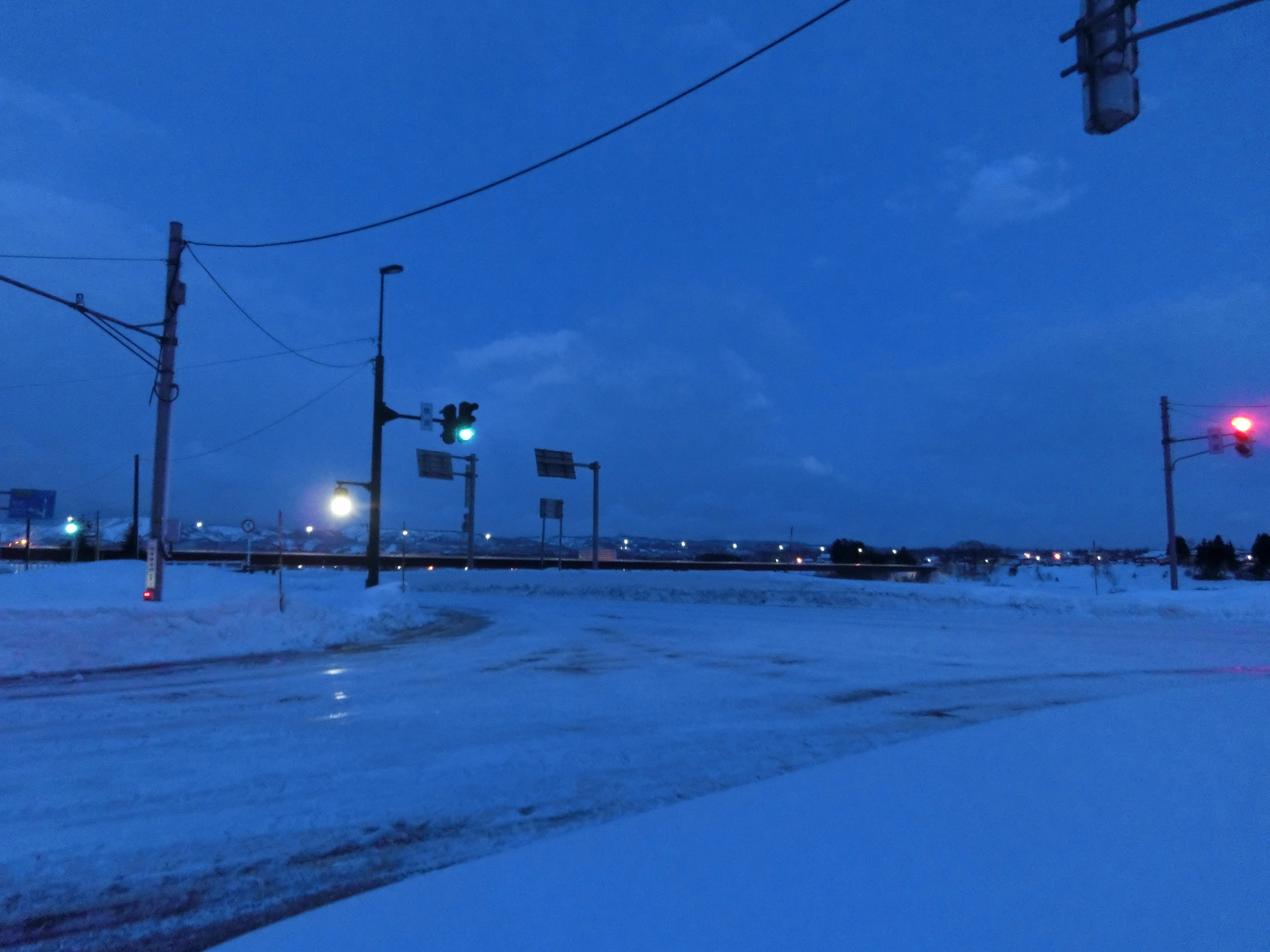 この画像は2018年2月18日未明投稿者によって、新潟県小千谷市横渡、横渡交差点そばにて撮影された、信濃川に架かっている小千谷大橋（国道17号）の写真。